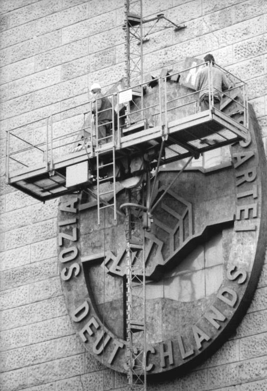 ADN-ZB Oberst-23.1.90 Berlin: SED-Symbol An der Vorderfront des ehemaligen ZK-Gebäudes am Werderschen Markt werden in Kürze nur noch einige Löcher im Putz daran erinnern, daß hier das Symbol der Partei hing. In dem Zeichen, das die Vereinigung von KPD und SPD im April 1946 symbolisierte, lag ursprünglich ein guter Sinn. Er ging in dem Maße verloren, wie innerhalb der Partei stalinistische Strukturen dominierten. Daher beschloß die SED-PDS auf ihrer letzten Vorstandssitzung, auf diese Symbolik zu verzichten.